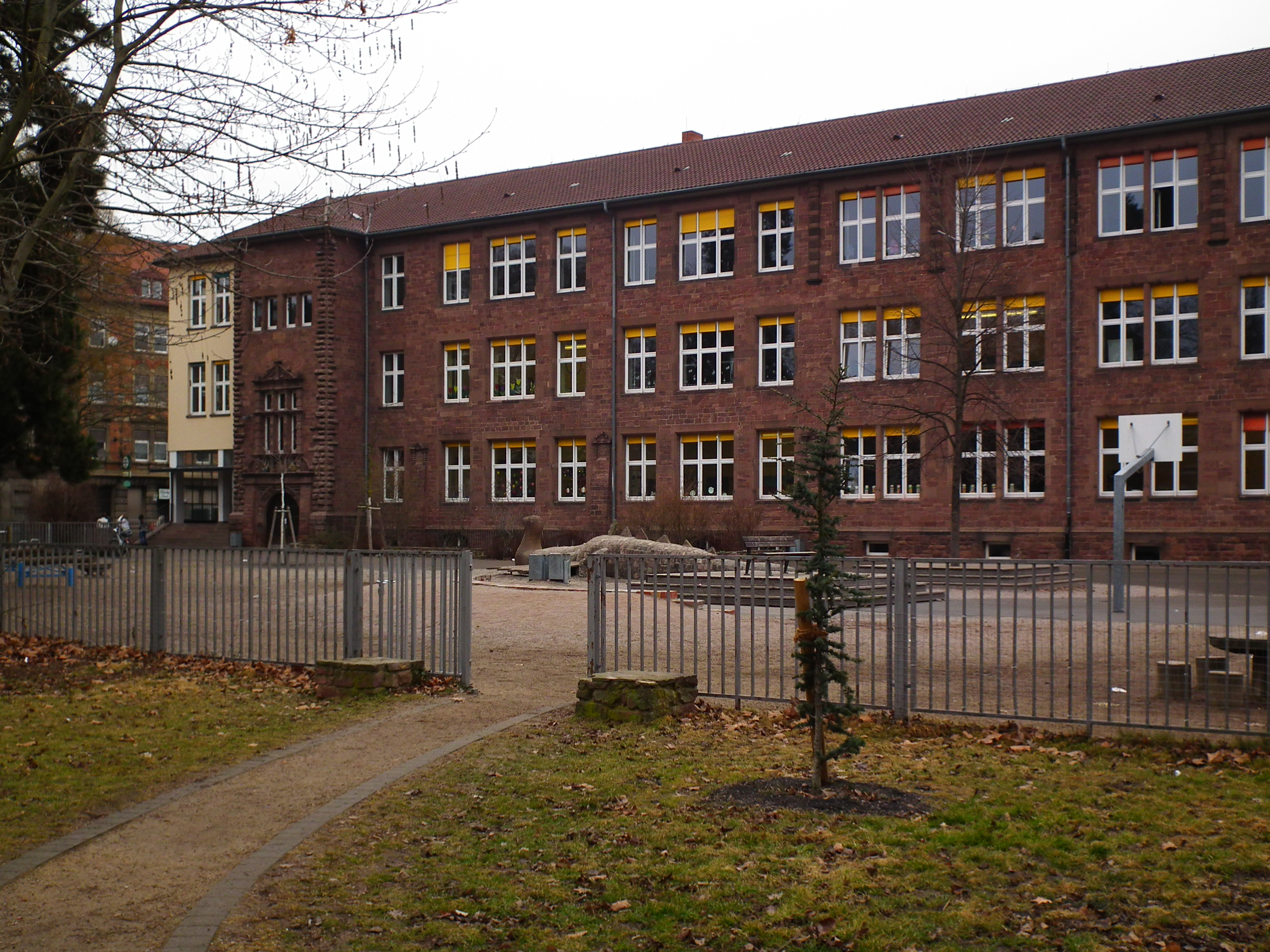 Schillerschule in Karlsruhe (Baden-Württemberg, Deutschland)